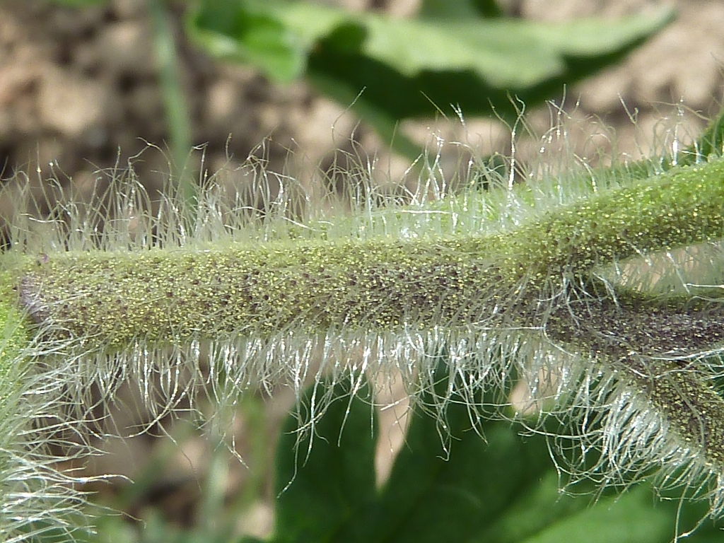 Solanum lycopersicum (Tomatera) : Detalle del tallo pubescente. - Cultivo, La Huerta, Albatera (Alicante, España).